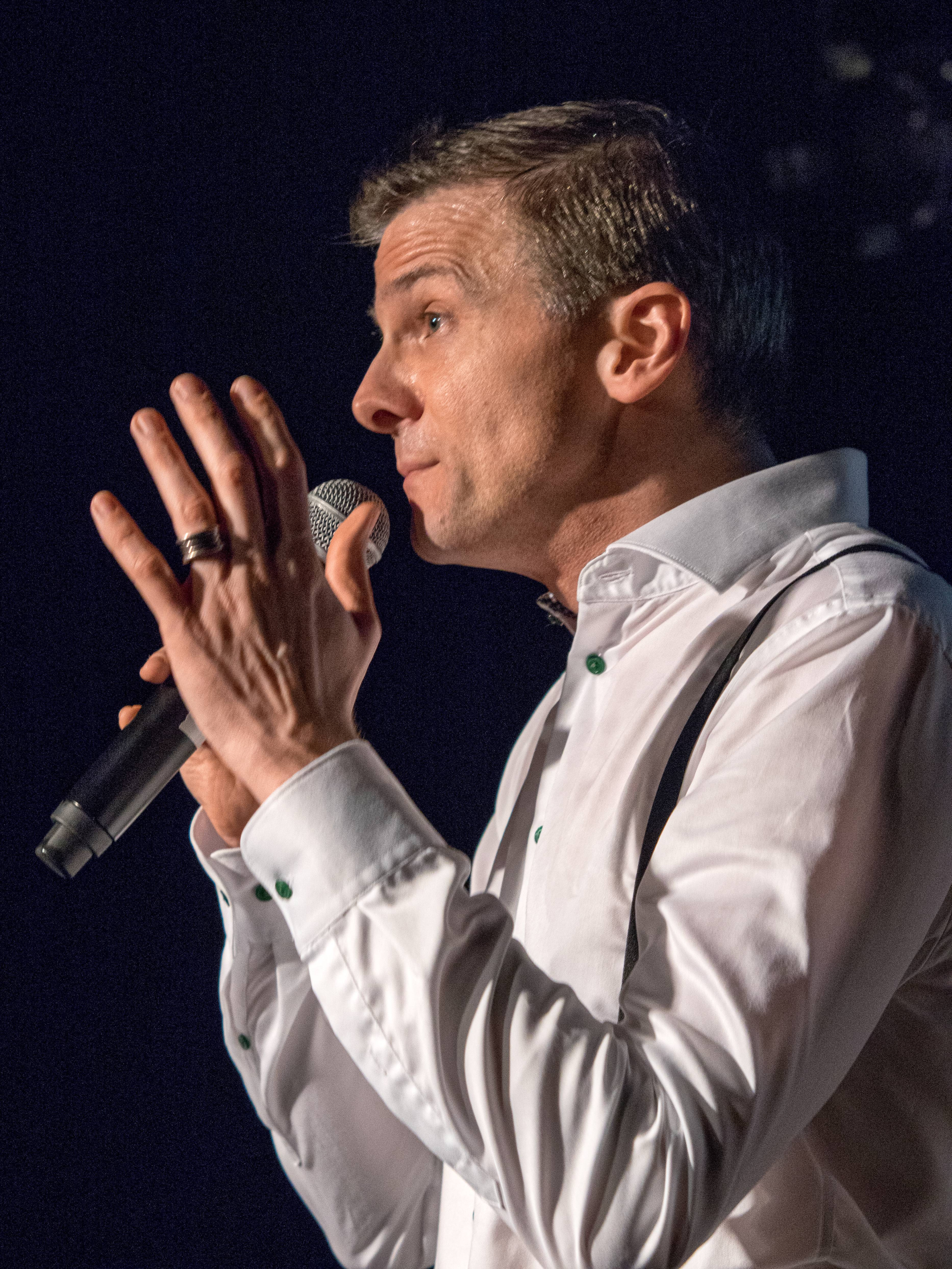 Bilder vom Konzert in Freiburg i. Br. Die A capella Gruppe Basta am 01. März 2015 Arndt Schmöle